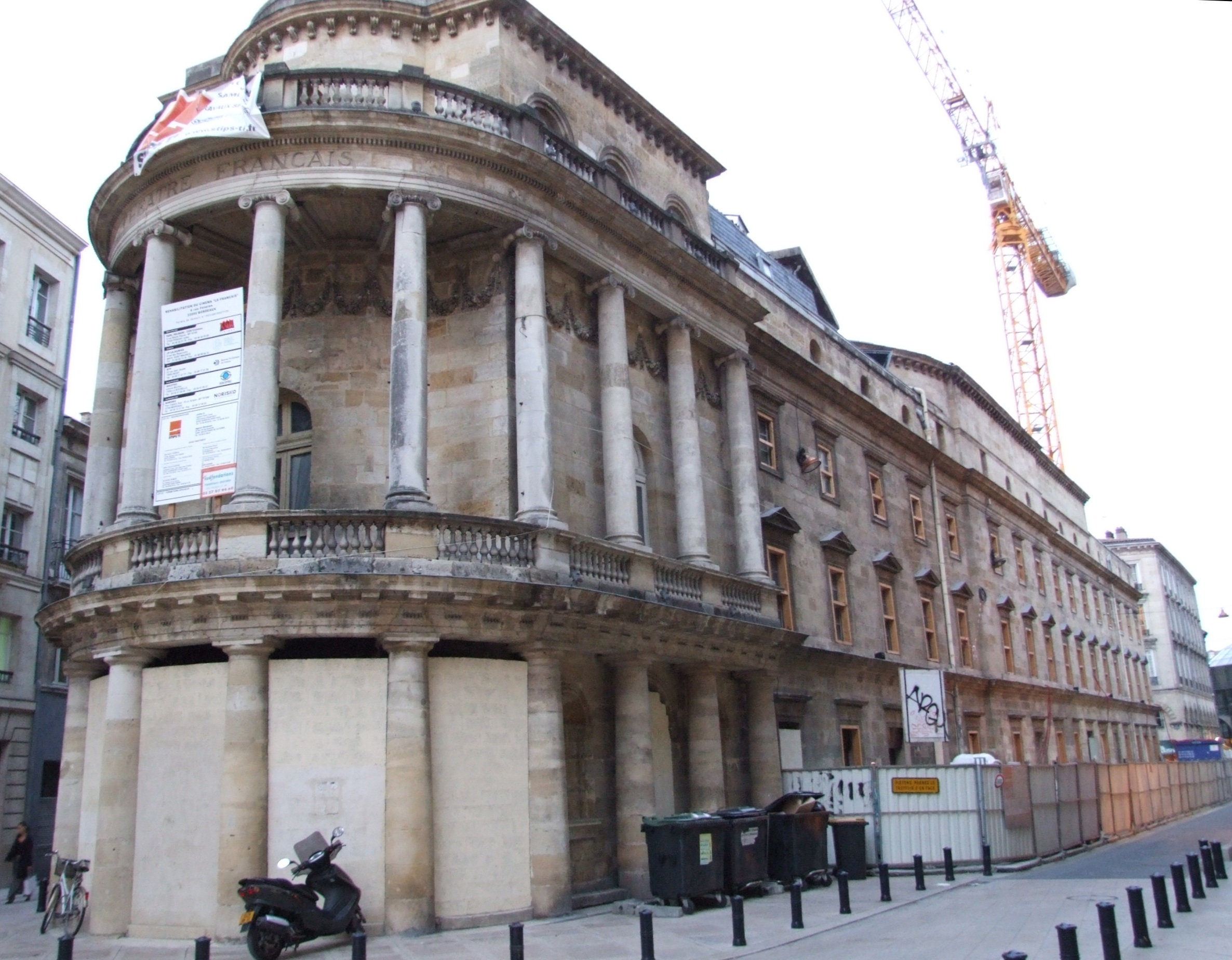 Théâtre Français, Bordeaux, Gironde, FRANCE